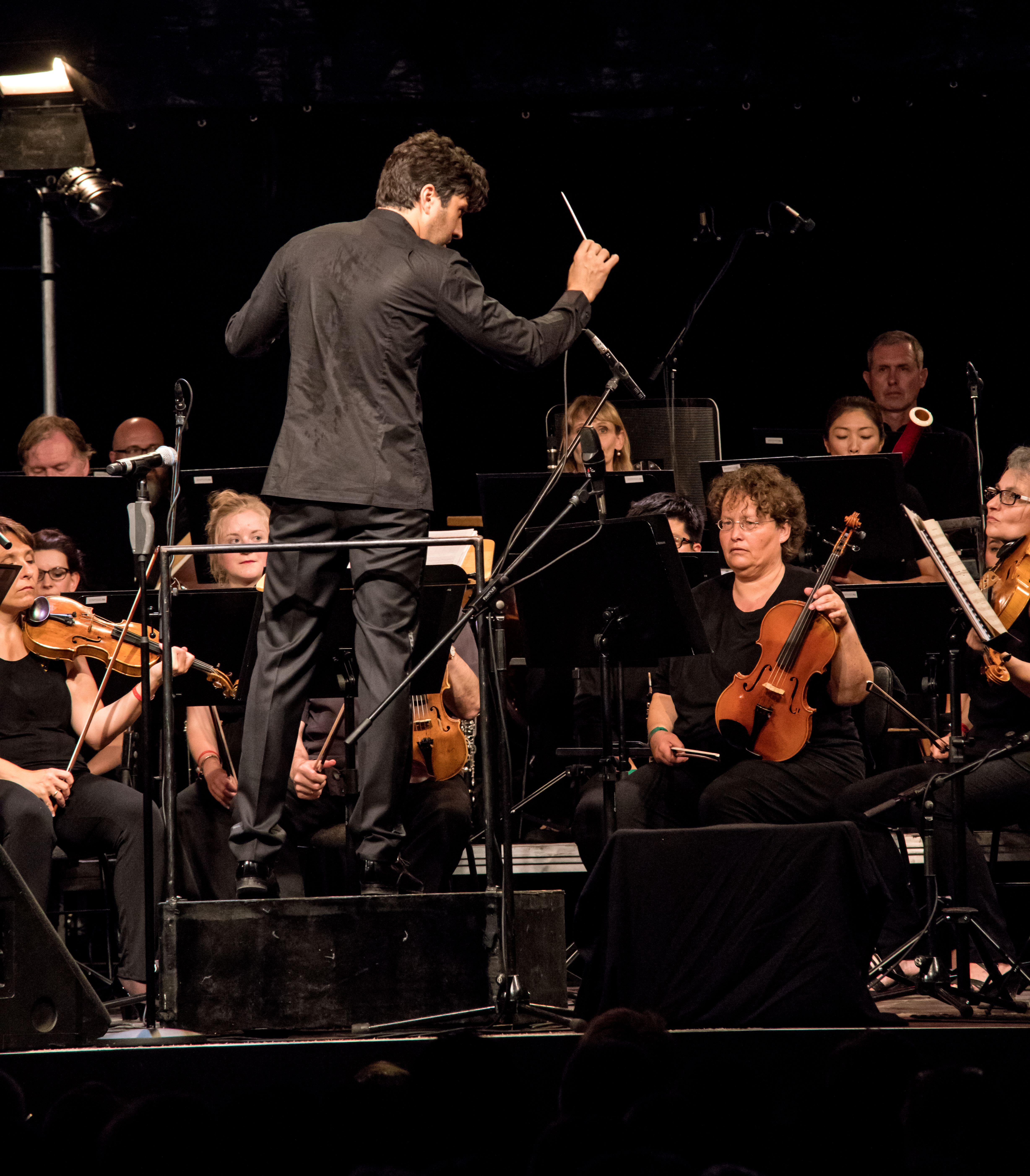 Bilder vom Zelt Musik Festival 2016 in Freiburg im Breisgau Die Gala